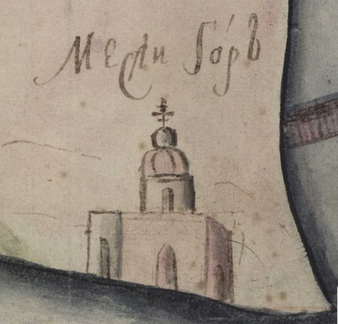 Фрагмент карти Київської губернії. XVIII століття. РГАДА, ф. 192, оп. 1, Киевская губ., № 5.